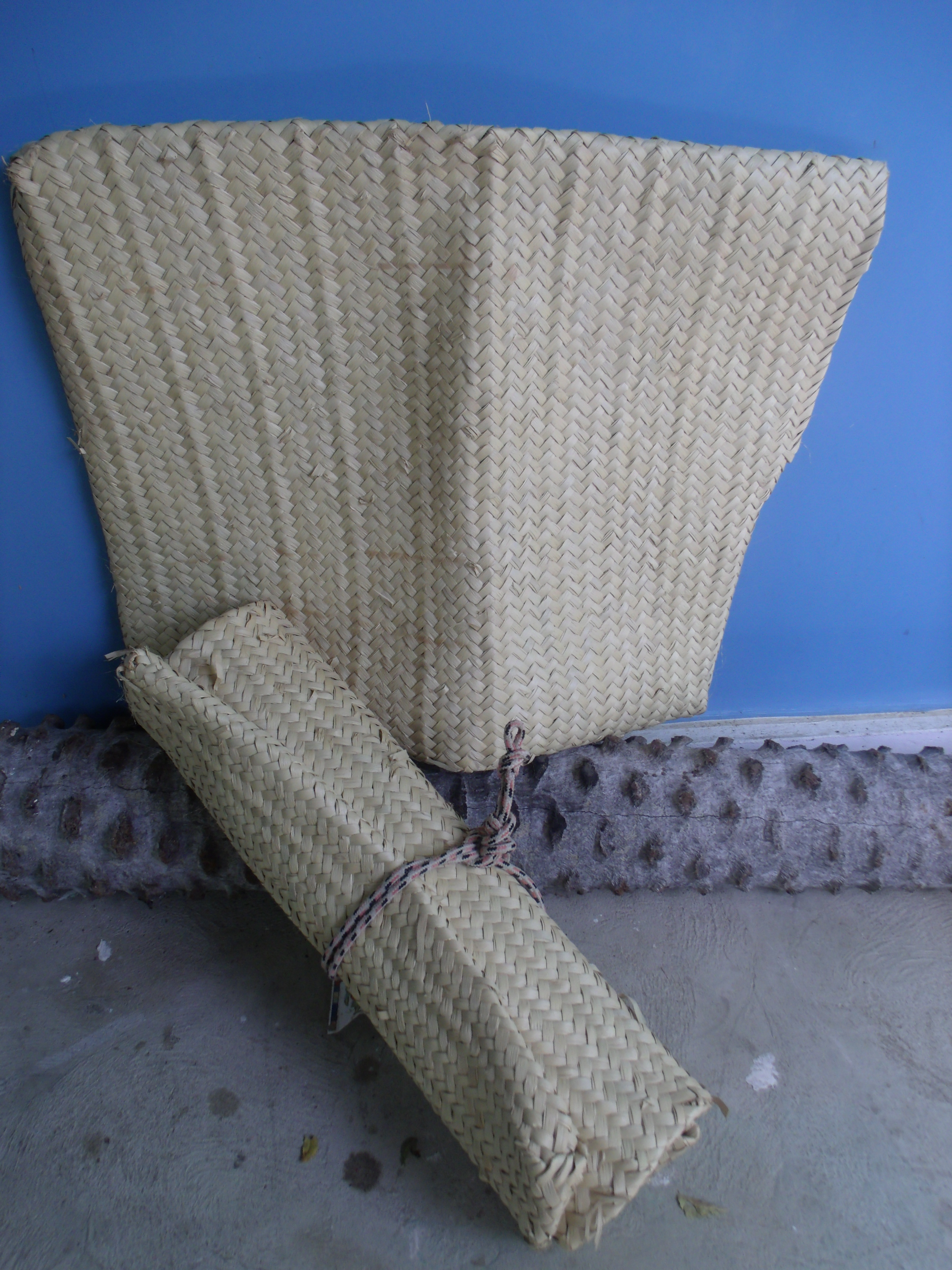 Surrão, uma embalagem cultural, feita com palha de carnaúba.